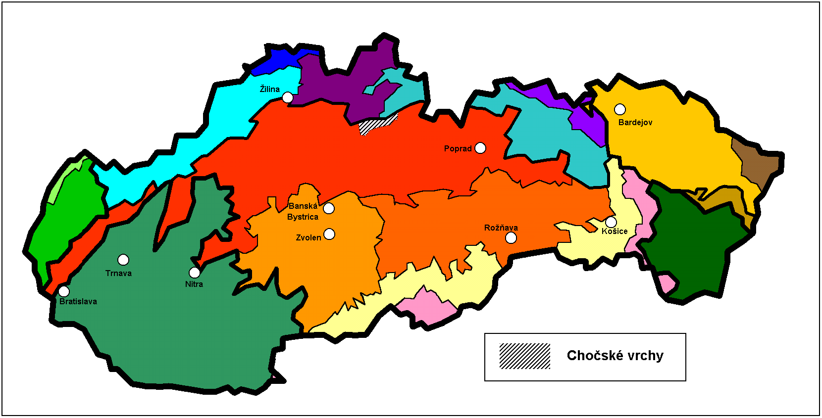 Chocske vrchy